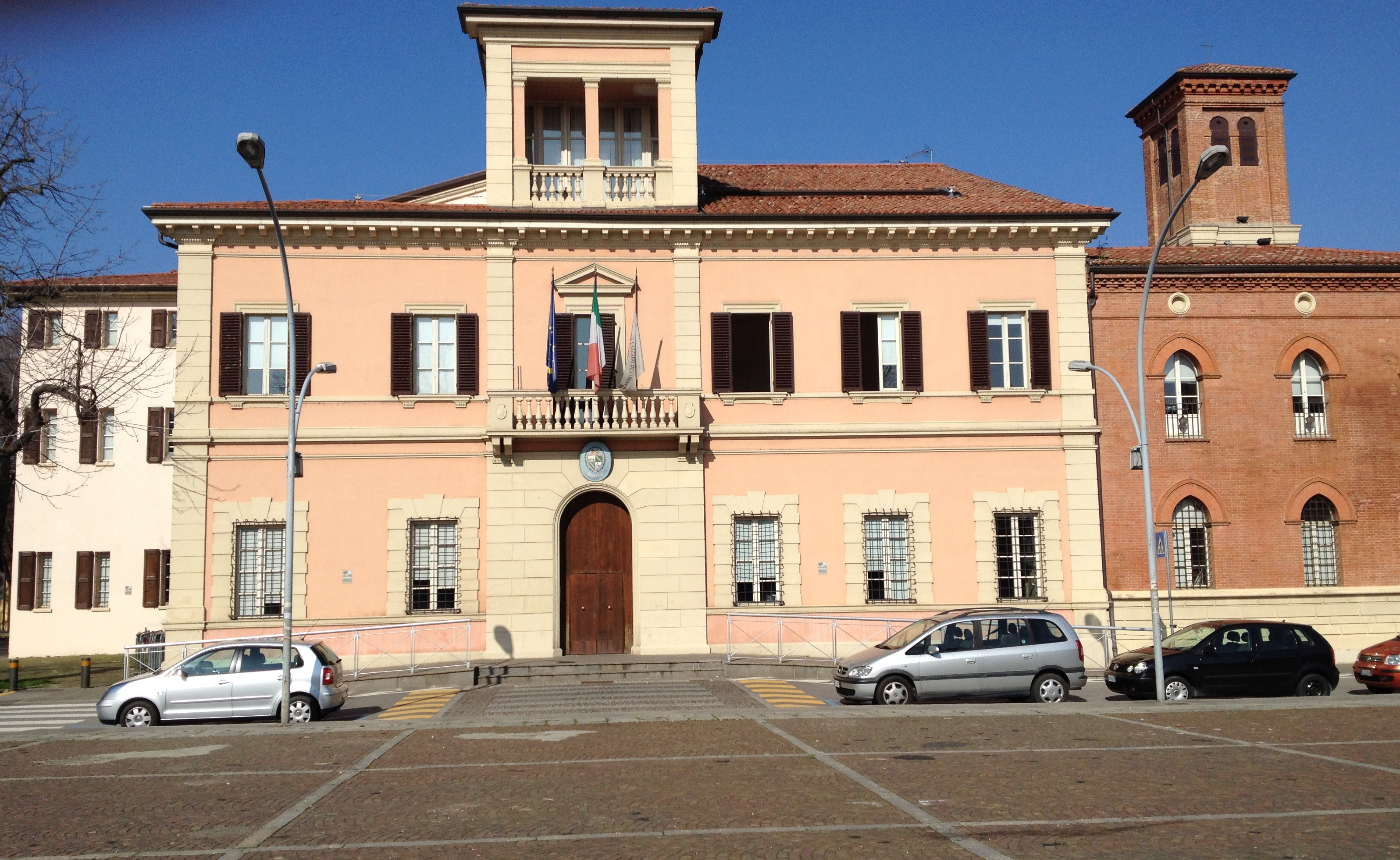 Municipio di San Lazzaro di Savena